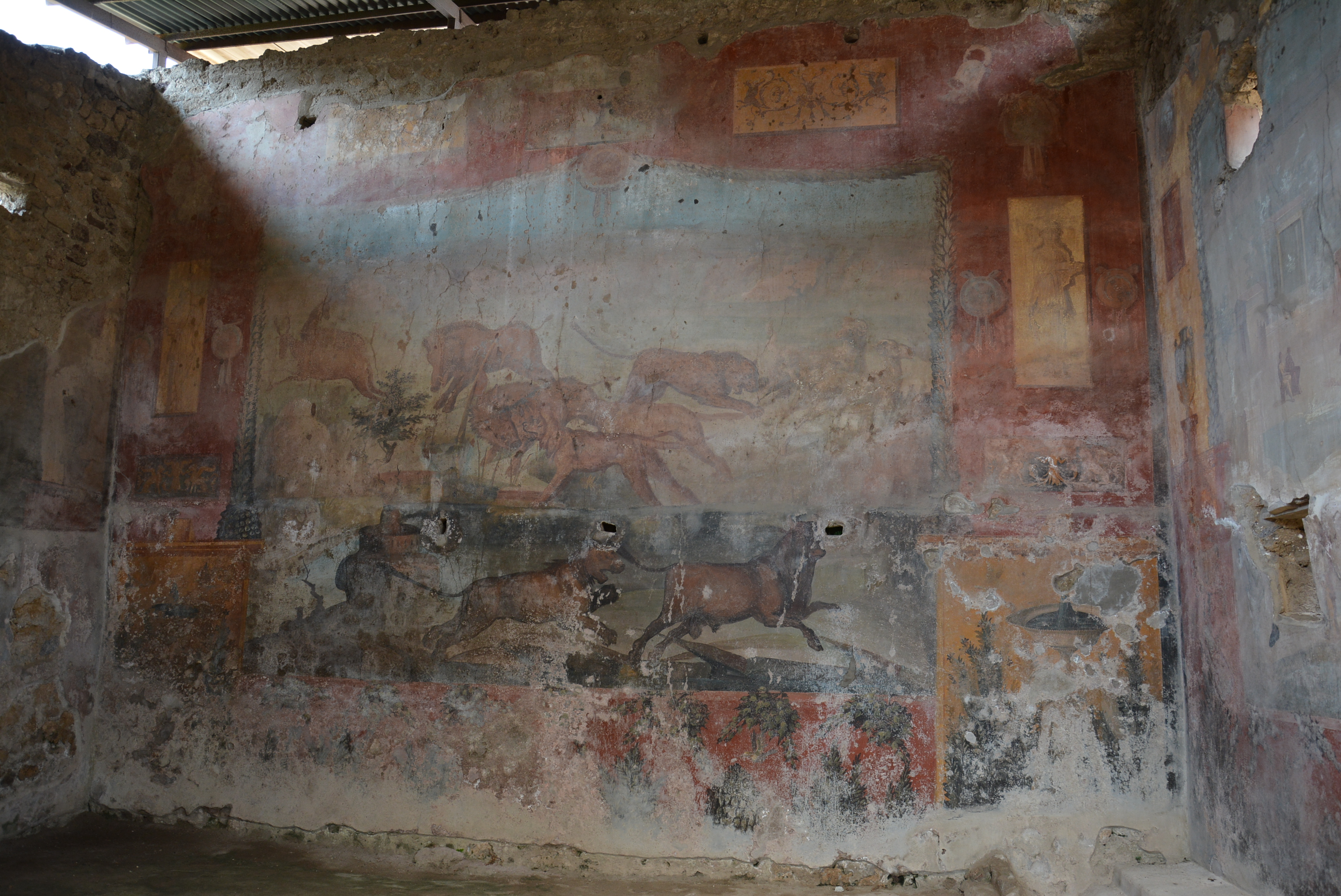 Casa dei Ceii - MIBACT This is a photo of a monument which is part of cultural heritage of Italy.